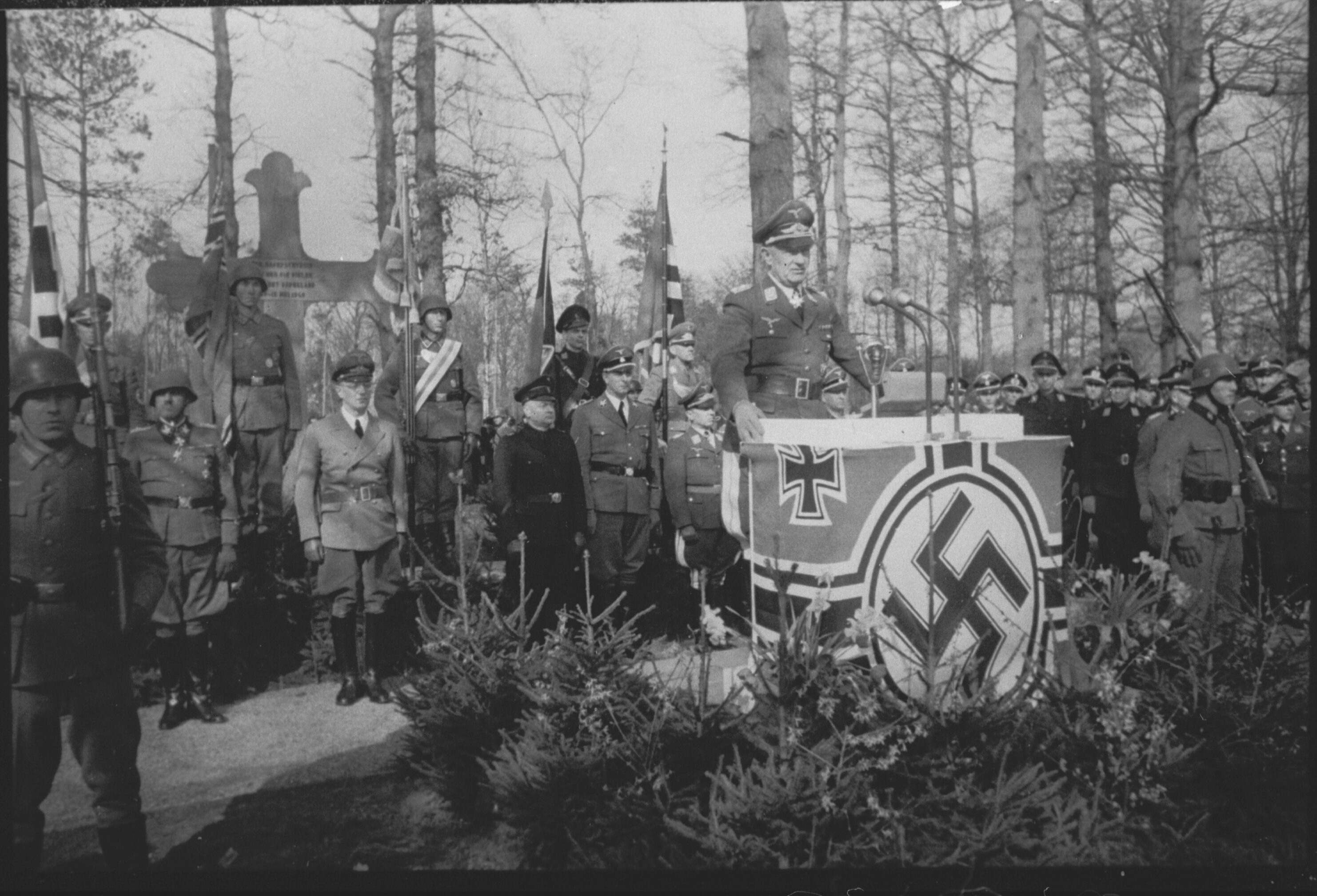 'Herdenking der gevallenen i.o. de 2de Wereldoorlog op de Grebbeberg' door de NSB en de Duitse Wehrmacht tijdens Heldengedenkdag op 21-3-1943. Deze foto is afkomstig uit het archief van de Fotodienst der NSB.